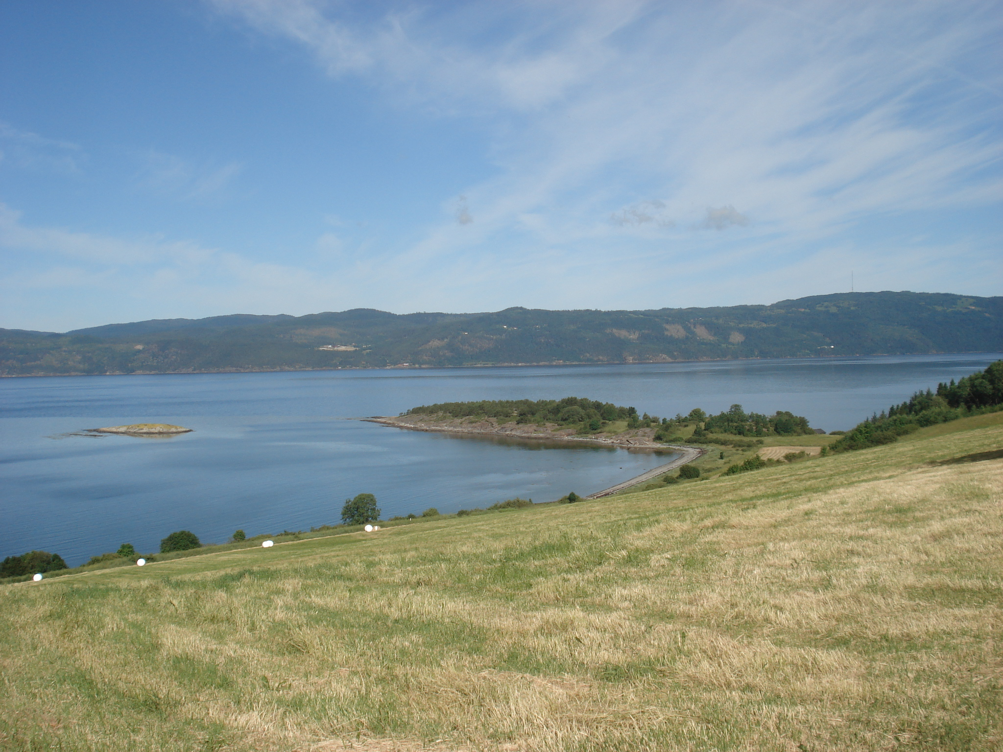 Vestremsholmen på Ekne.